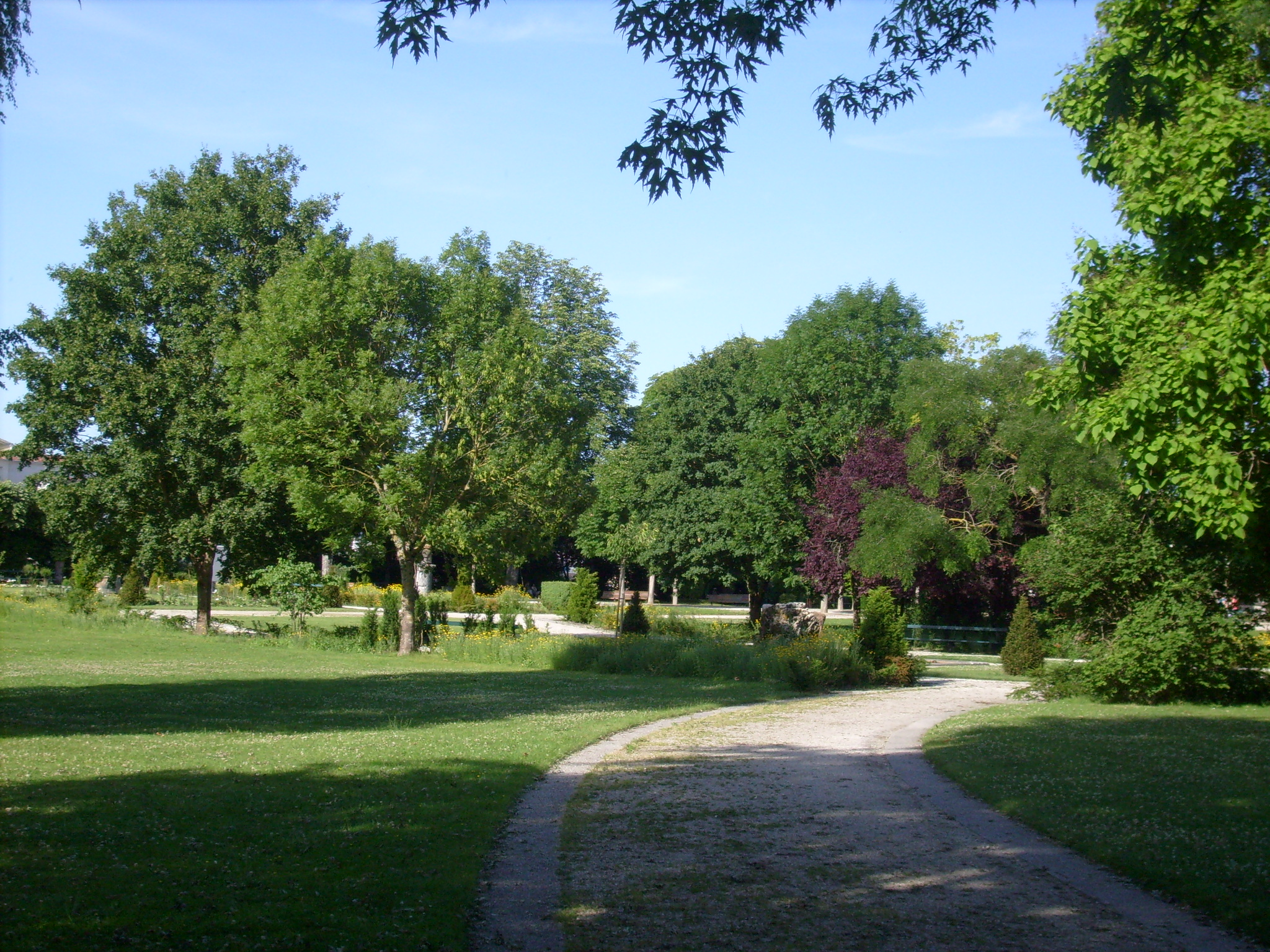 Le jardin public de Saintes